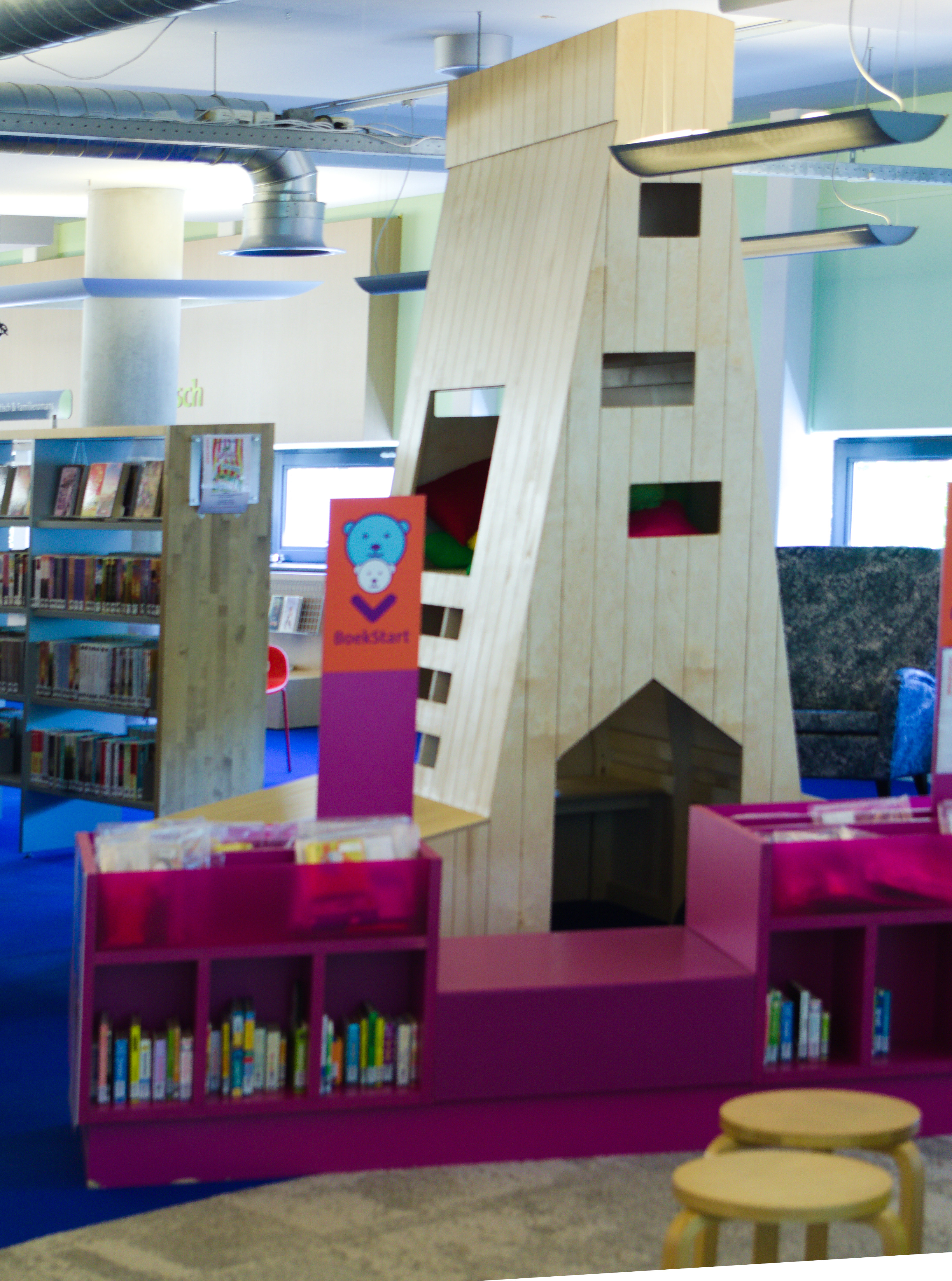 Zouthuisje waar kinderen in kunnen kruipen met een boek, Bibliotheek Hengelo zomer 2020